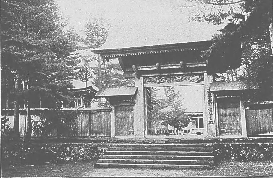 説明文に「婦負郡黒瀬谷村に在り法華宗本成寺派の中本山なり」とあり